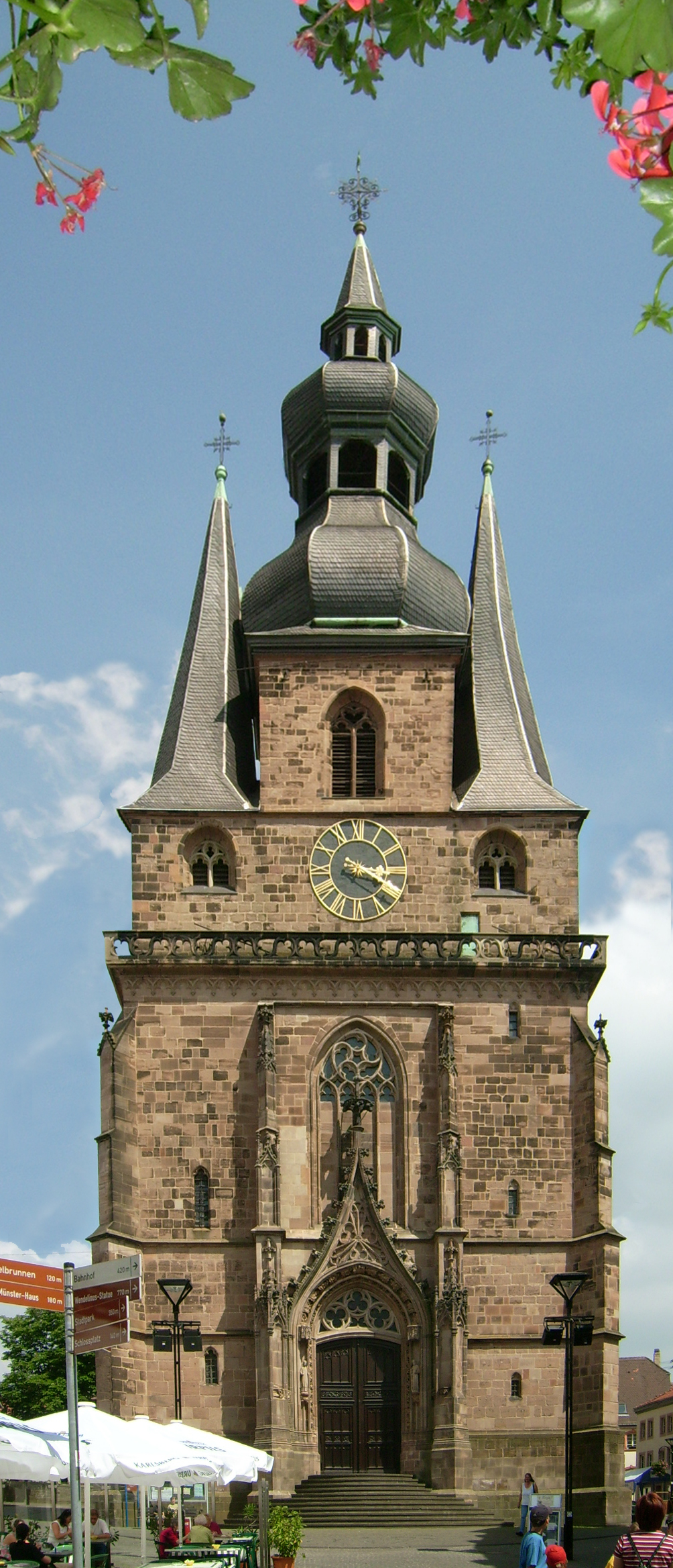 Dom Basilika in St. Wendel Front Wendelinus Wendalinus